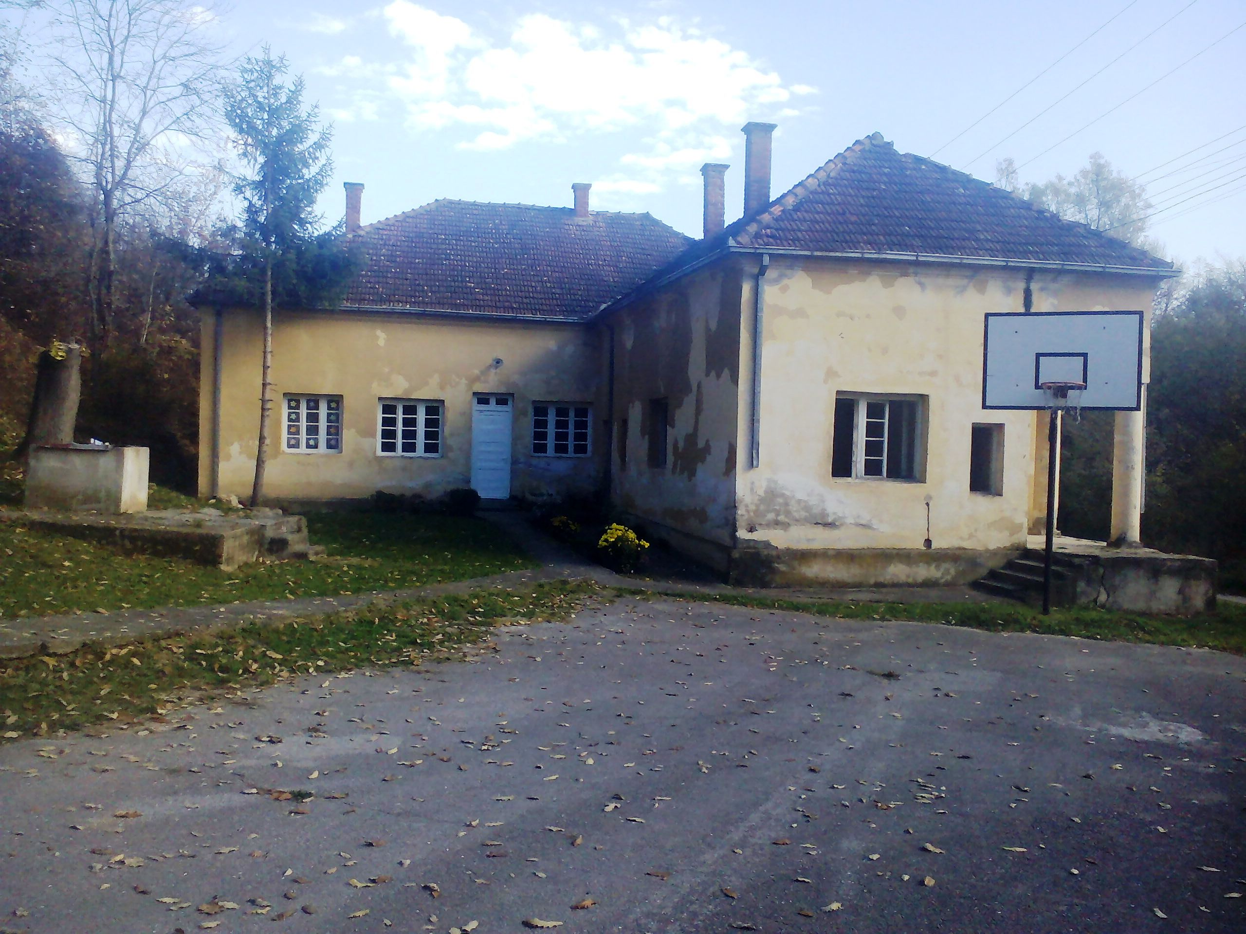 Поглед са улице